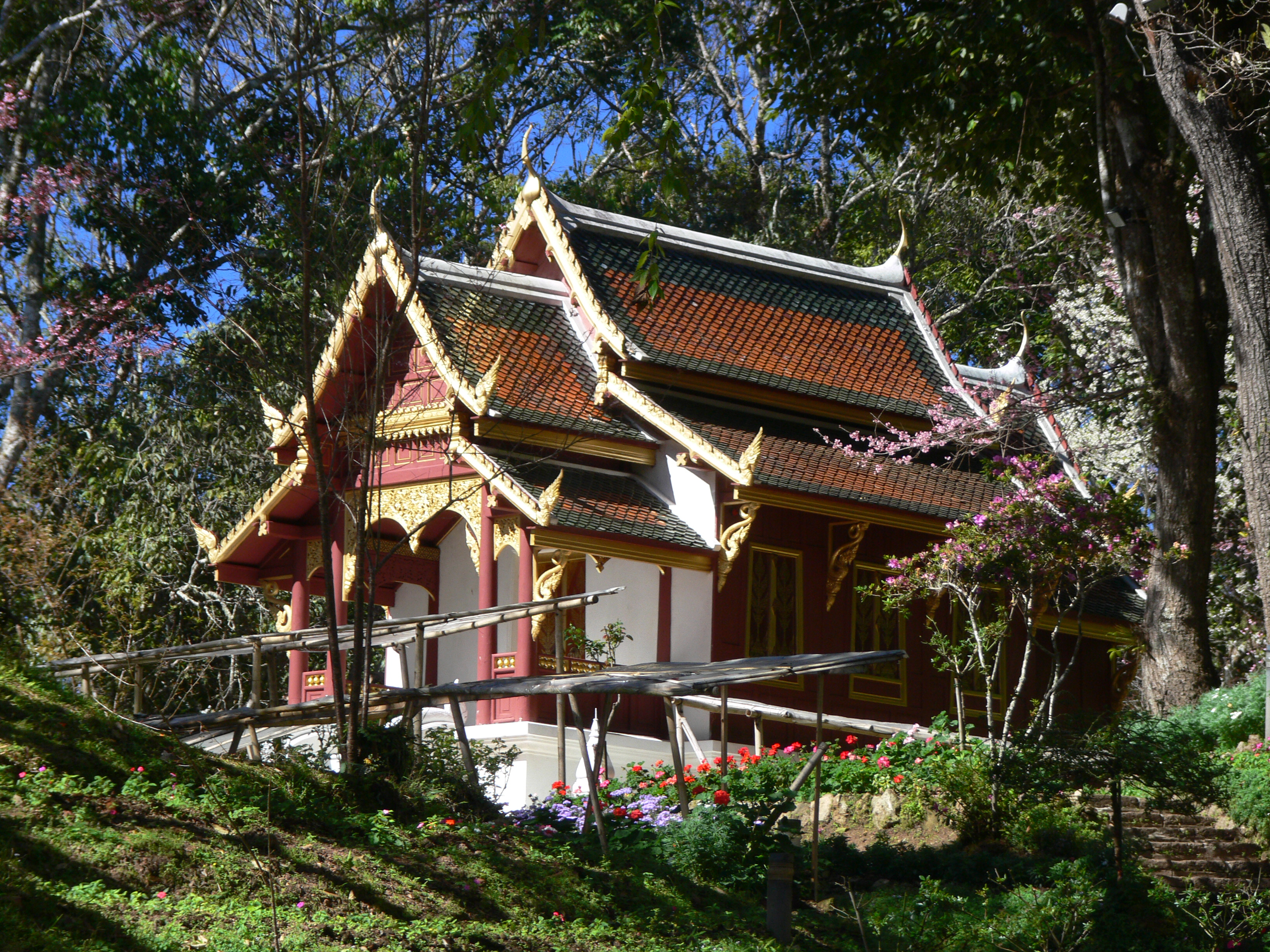 Bhubing-Paleis bij Chiang Mai